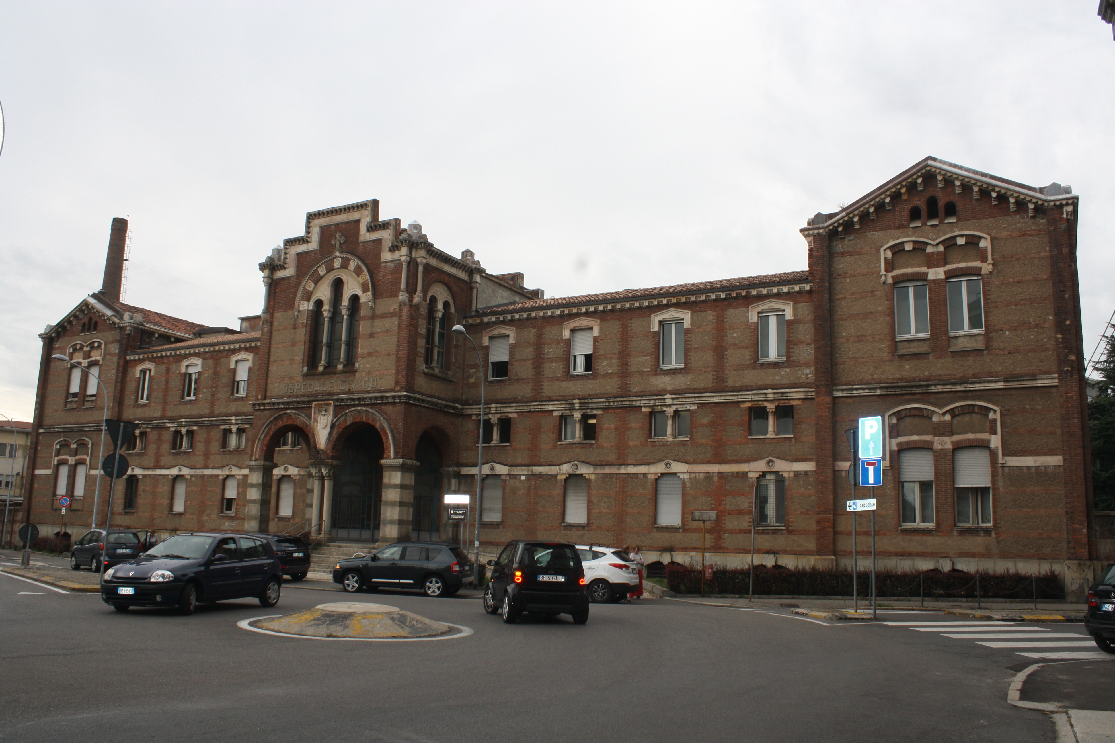 Padiglione Boito dell’Ospedale di Gallarate This is a photo of a monument which is part of cultural heritage of Italy.